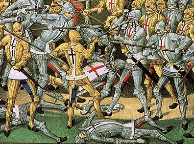 Le Combat des Trente (entre Ploërmel et Josselin) en 1351. Détail d'une miniature tirée de la Compillation des cronicques et ystoires des Bretons (1480), de Pierre Le Baud.